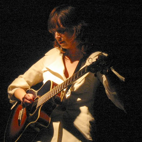 Cristina Donà in concerto al Babylonia di Ponderano (BI), 17 gennaio 2004